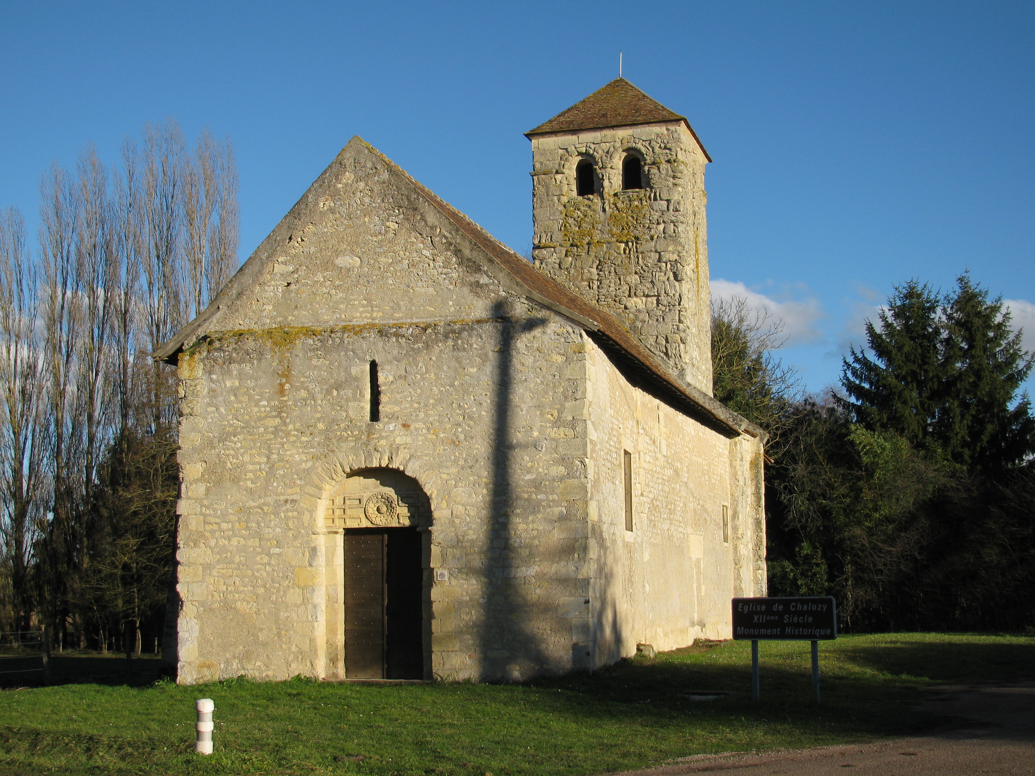 Église Saint-Symphorien de Chaluzy, XIIe siècle, à Saint-Éloi, Nièvre France.